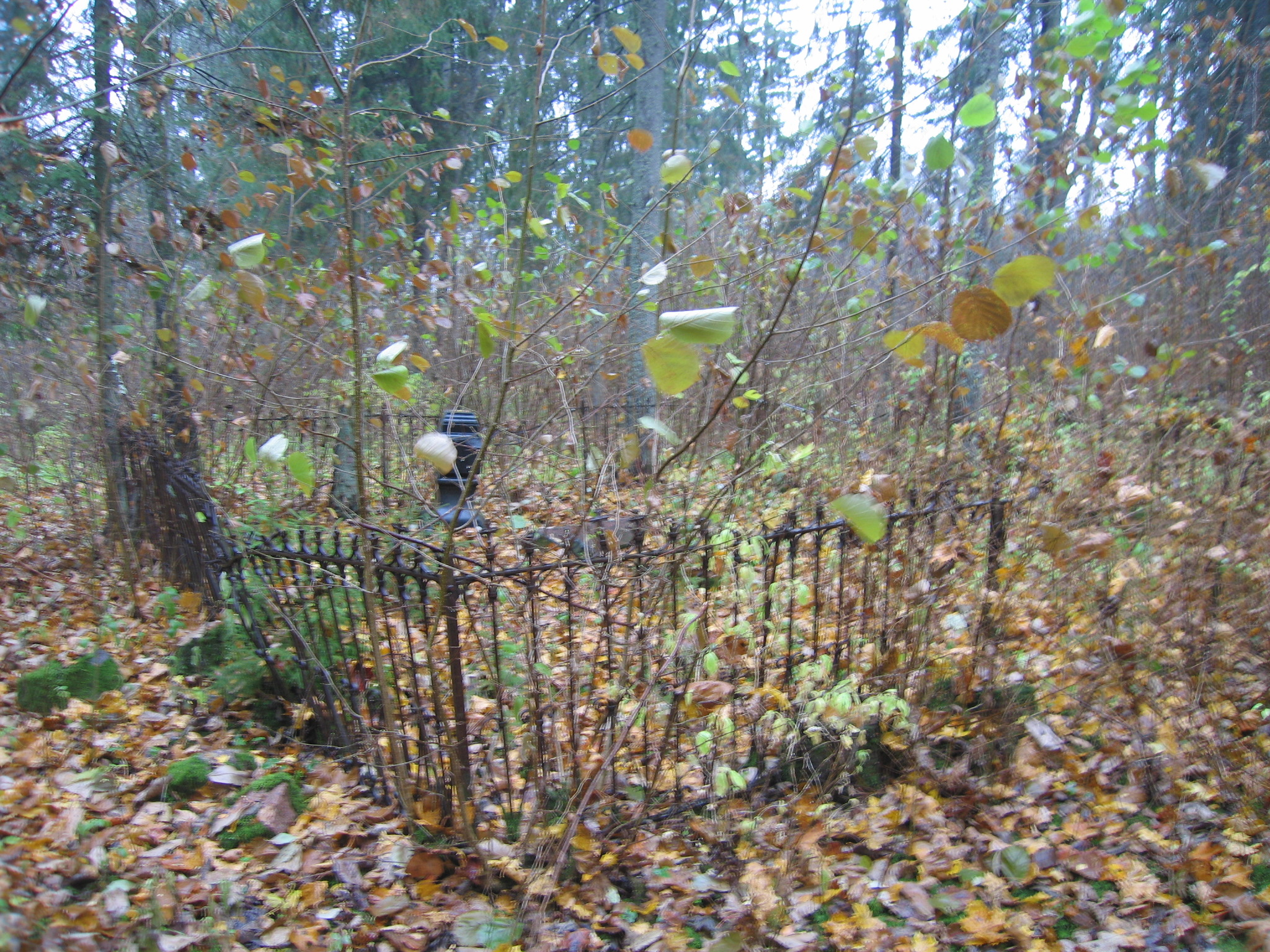 Udriku mõisa kalmistu vaade